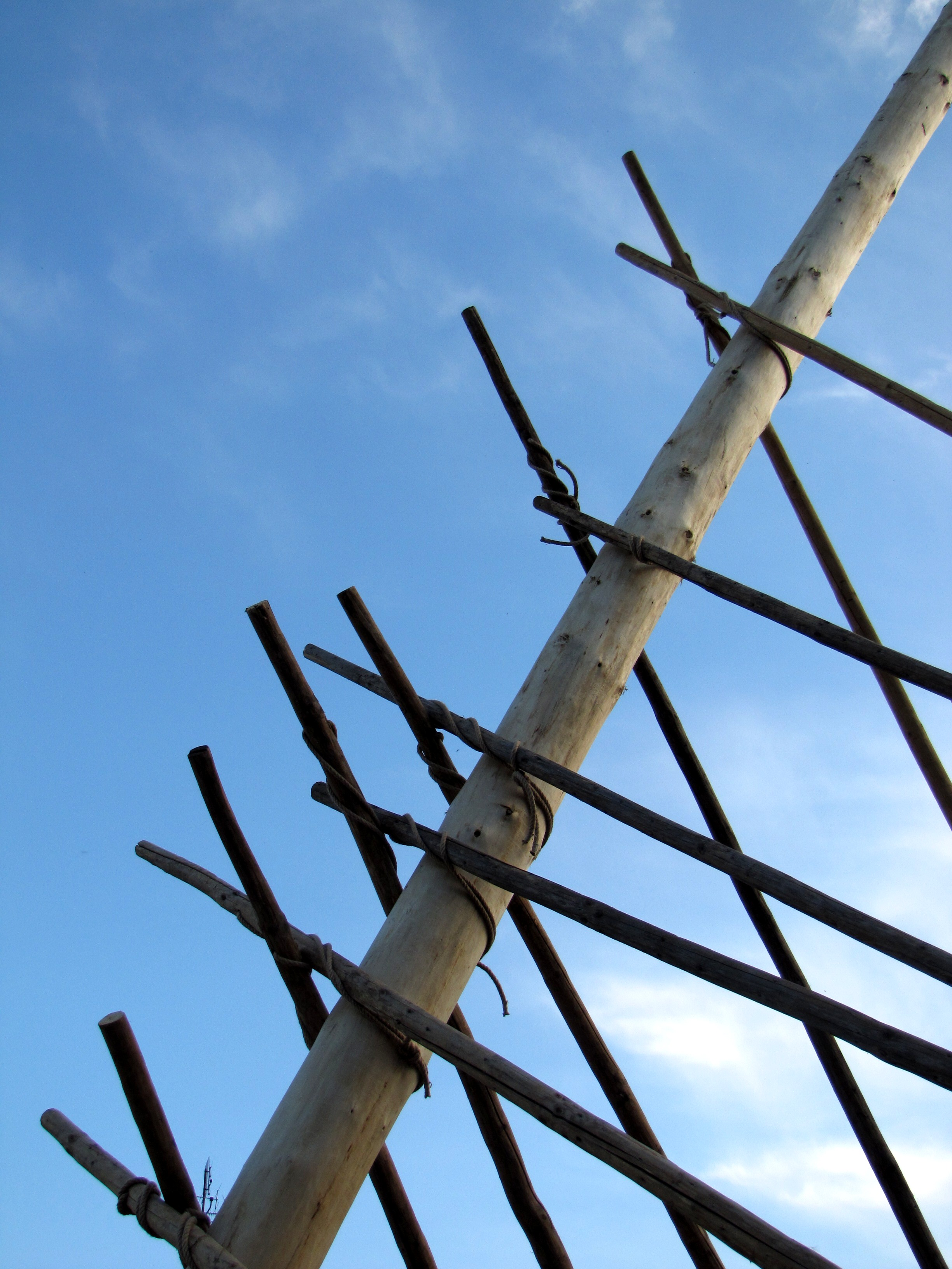 Slovácký rok v Kyjově - stavění máje na náměstí